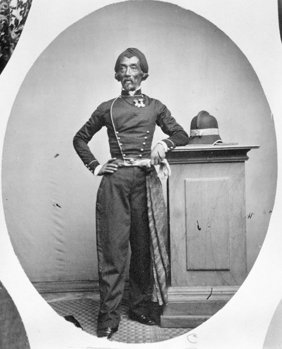 Foto. Portret van de kunstschilder Raden Saleh in uniform, Java